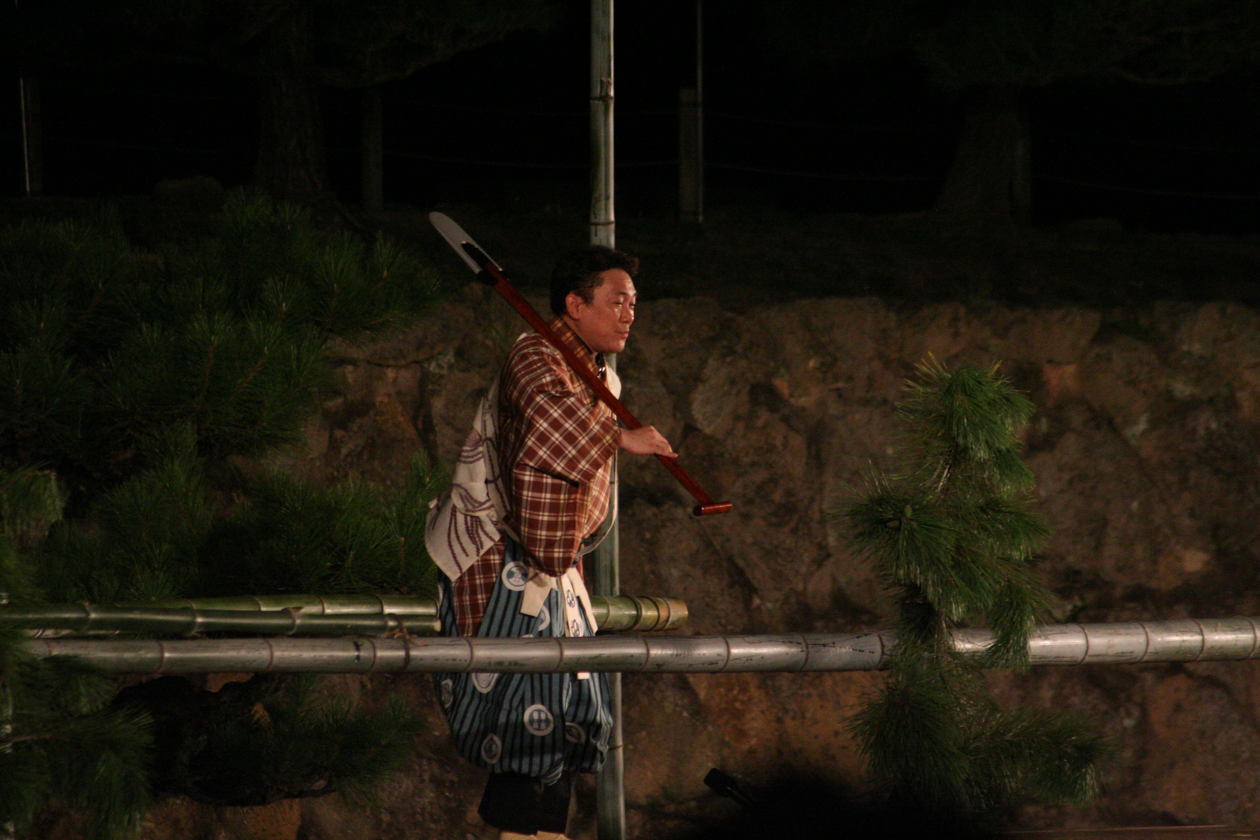 2009年7月31日に姫路城三の丸広場で行なわれた姫路薪能の様子。